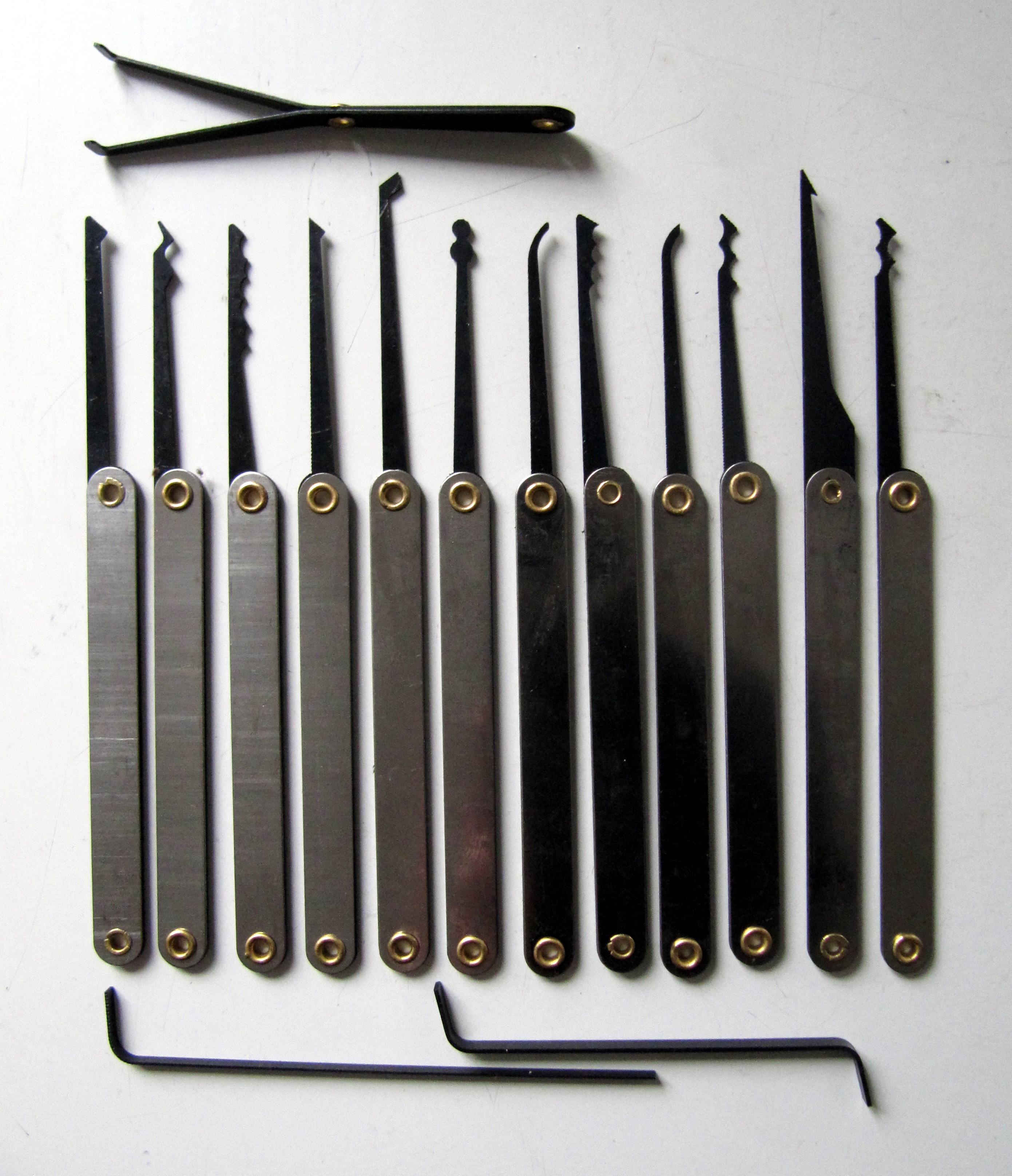 Typisches Lockpickingset (Picks und Spanner)